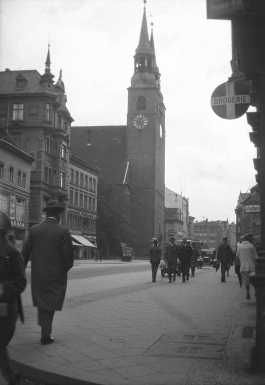 Breiteweg med Katharinenkirche Motiv: Magdeburg Kategori: Stadsmiljö, (01) Exteriörer Breiteweg med Katharinenkirche.